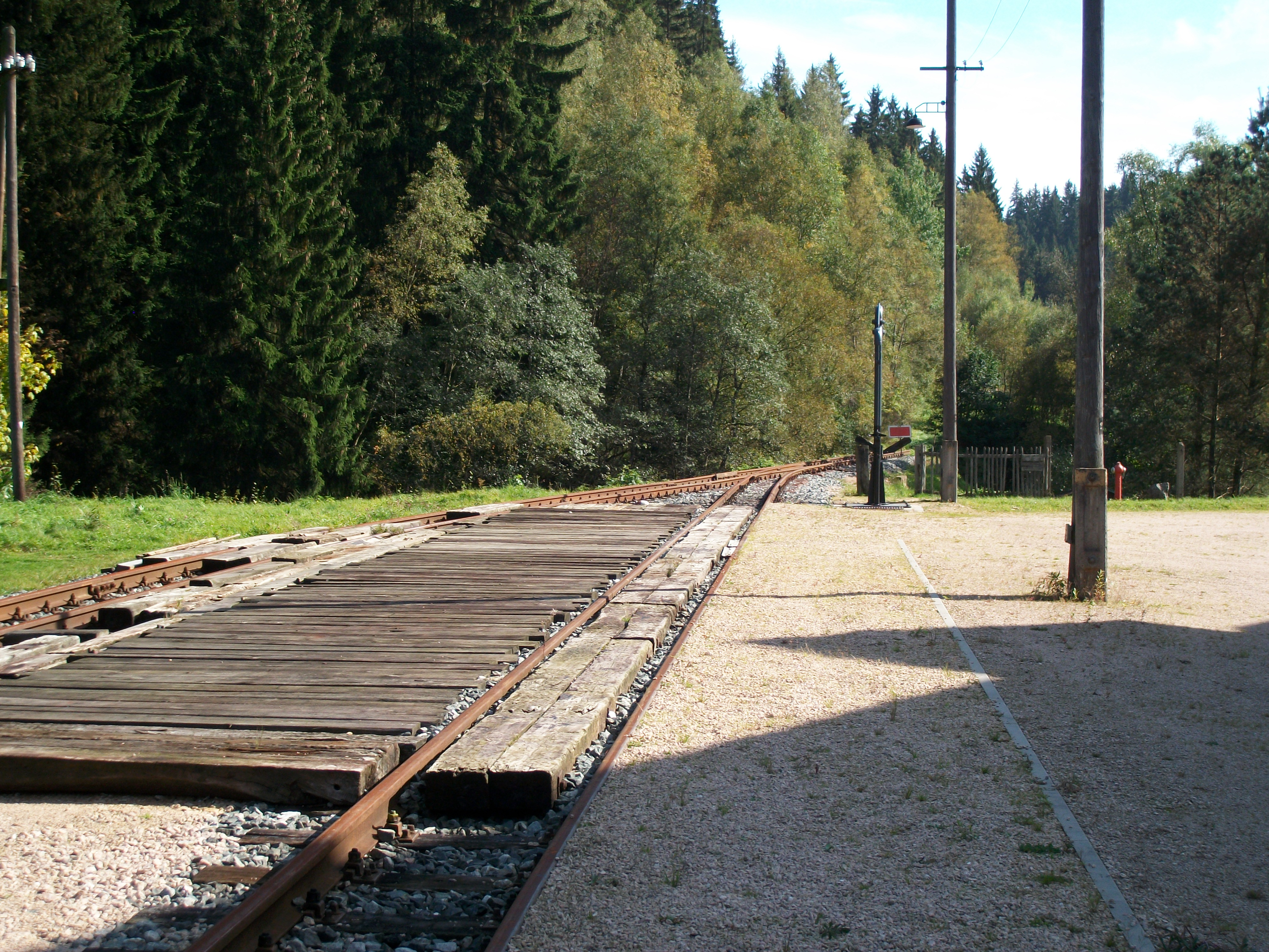 WCD in Wilzschhaus